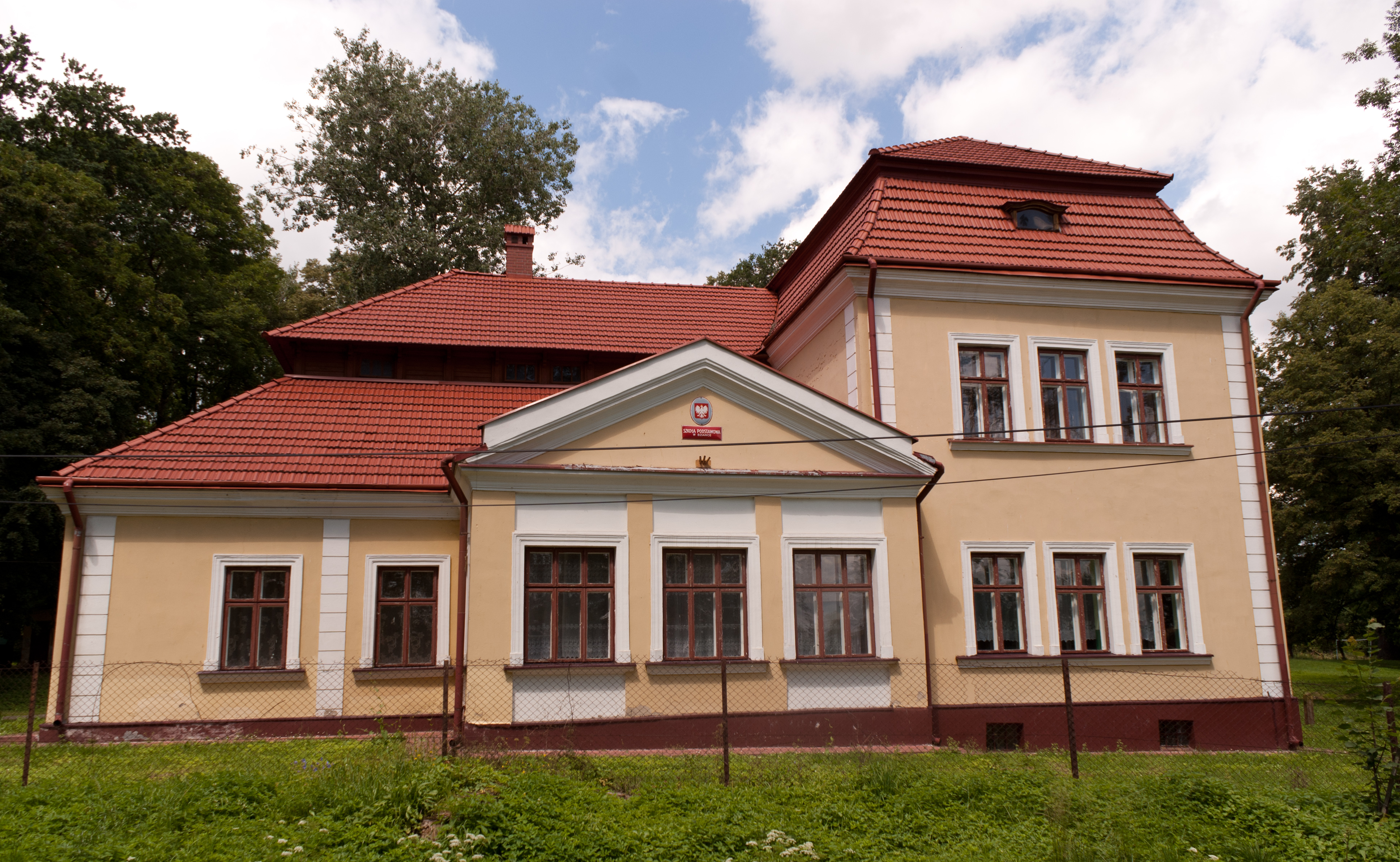 Szkoła podstawowa w Bziance.